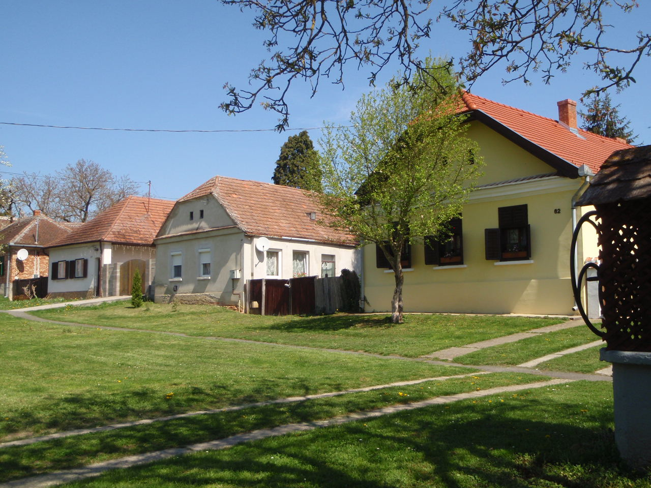 Nagykölked Fő utcai lakóházak